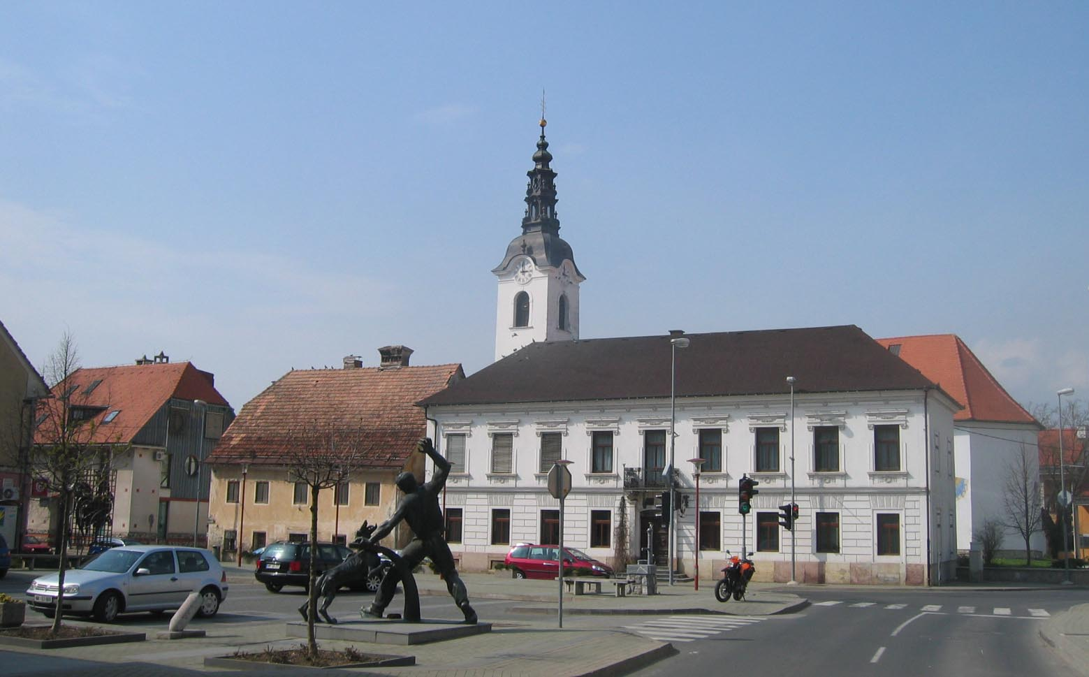 Šentjernej, town in Dolenjska region, Slovenia (main square) photo:Ziga 21:47, 1 April 2007 (UTC)